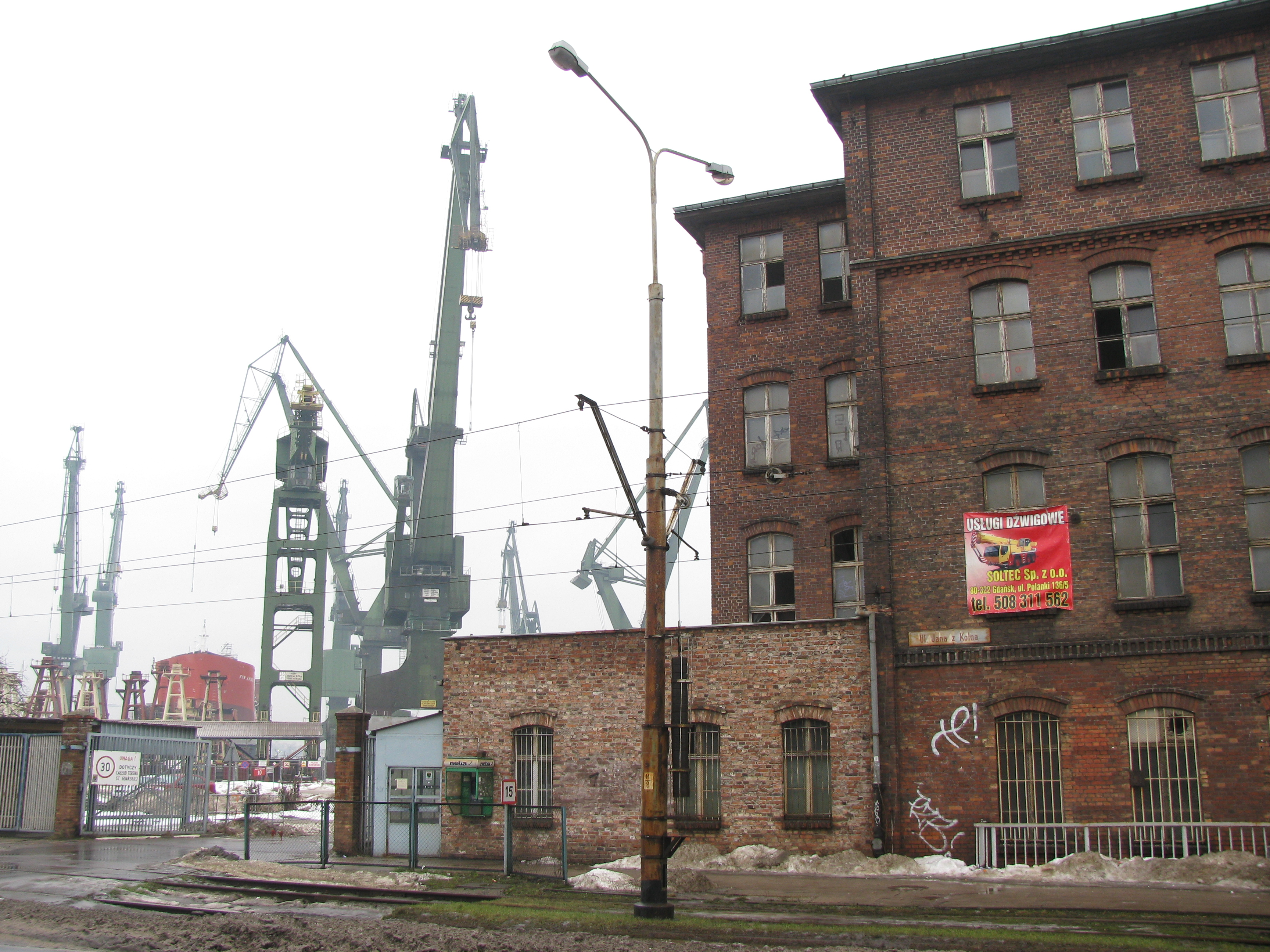 Stocznia Gdańska - III brama, dawna brama Stoczni Schichaua.